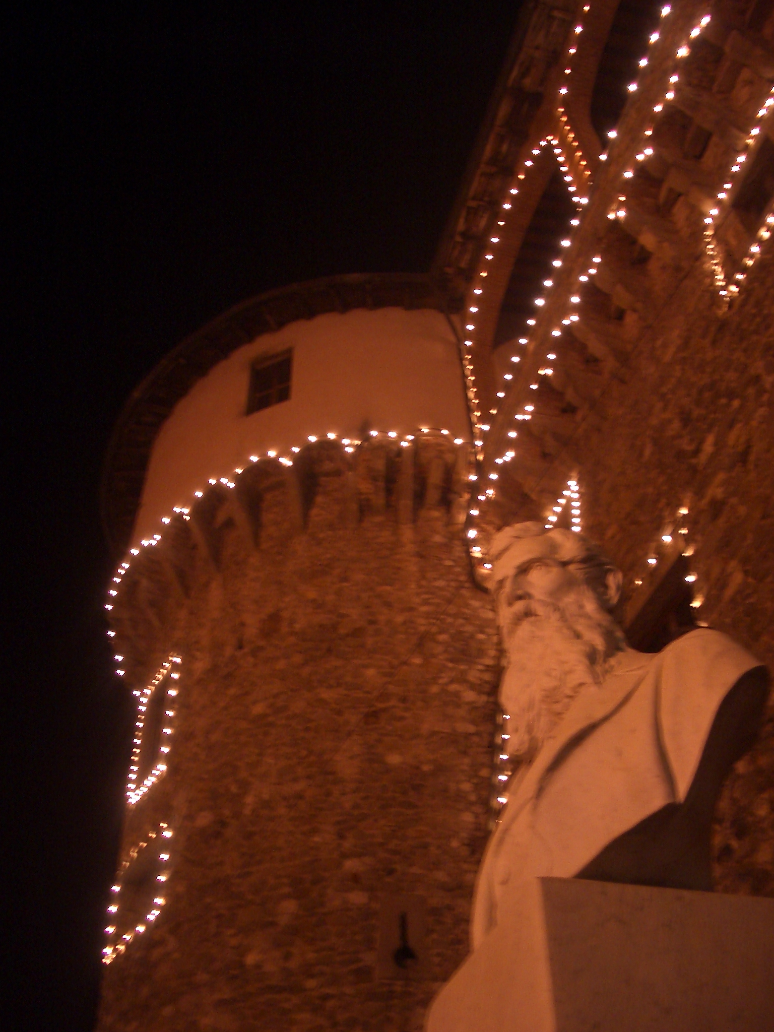 Desriptions Busto al generale Nicola Fabrizi. Scolpito da Antonio Allegretti, fu collocato al riparo della Rocca Ariostesca di Castelnuovo di Garfagnana nel 1888 per volontà della Società Operaia: all'inaugurazione erano presenti, tra gli altri, il deputato Paolo Fabrizi (nipote del generale), Antonio Mordini e Menotti Garibaldi, primogenito del grande Giuseppe Garibaldi, che tenne l'orazione.